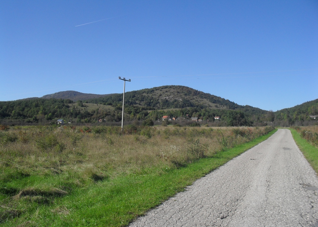 Поглед на село Бировачу из правца Доњег Лапца, Лика.